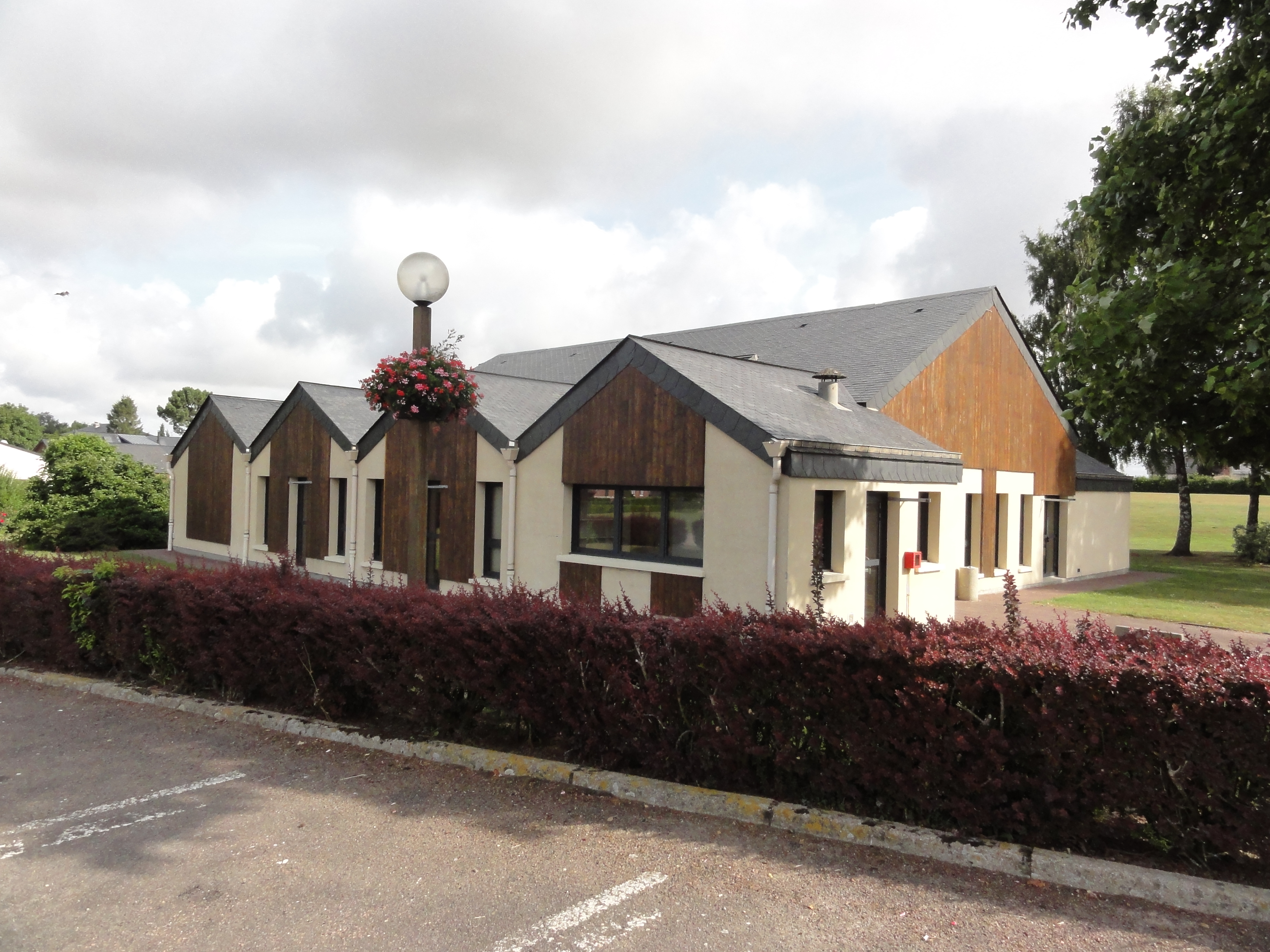 Valliquerville (Seine-Mar.) salle polyvalente